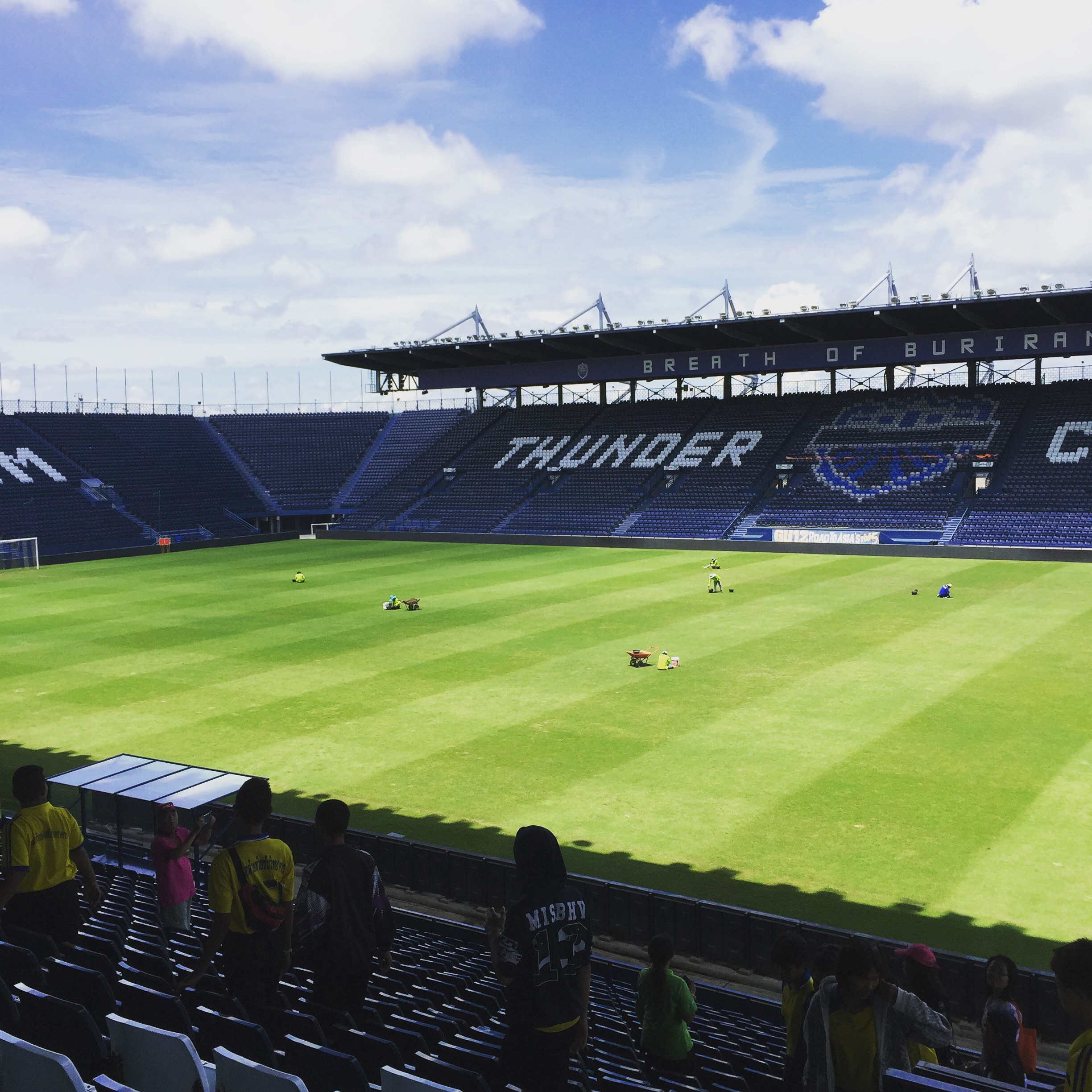 Isan, Mueang Buri Ram District, Buri Ram 31000, Thailand